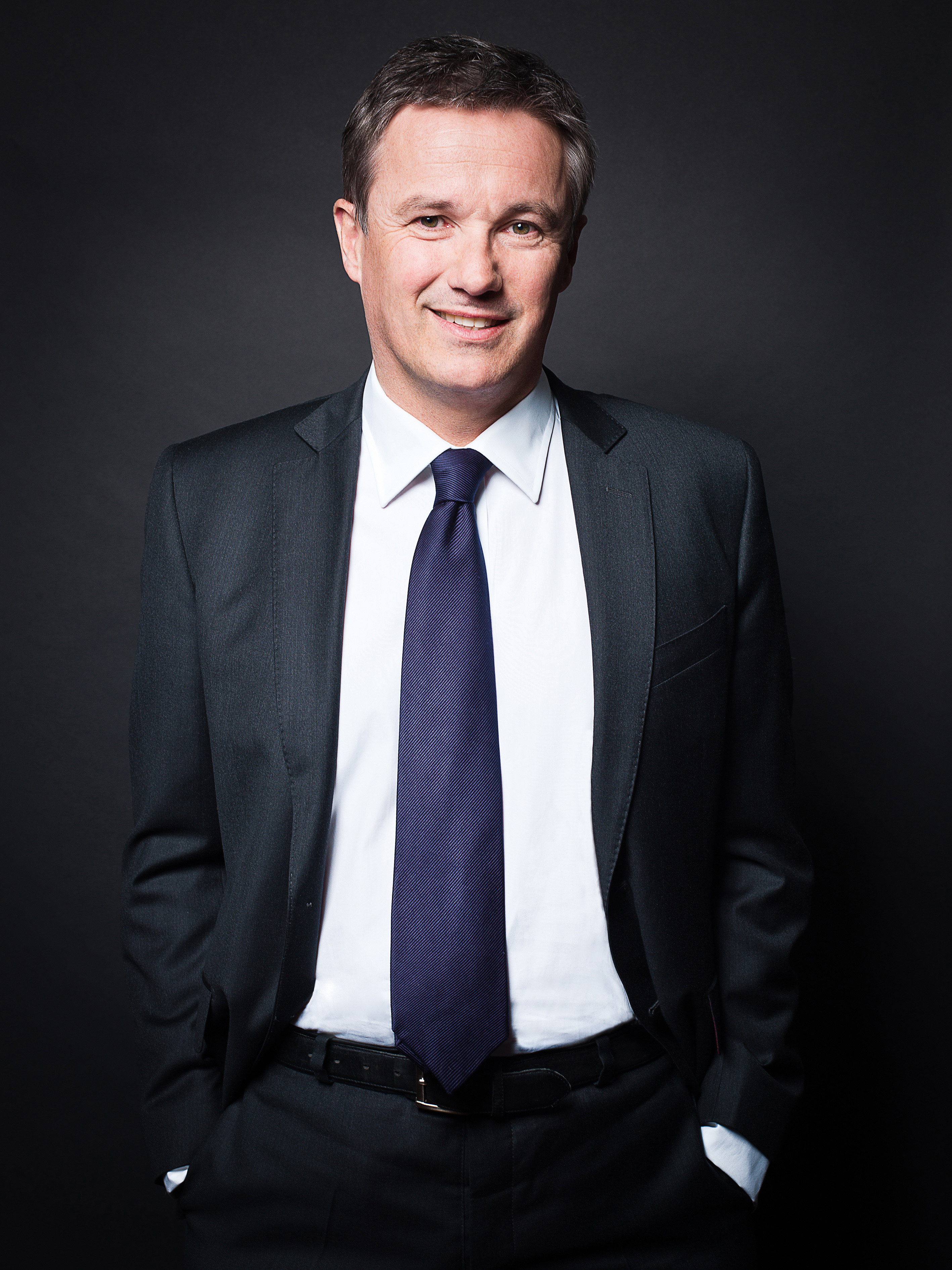 Portrait 3